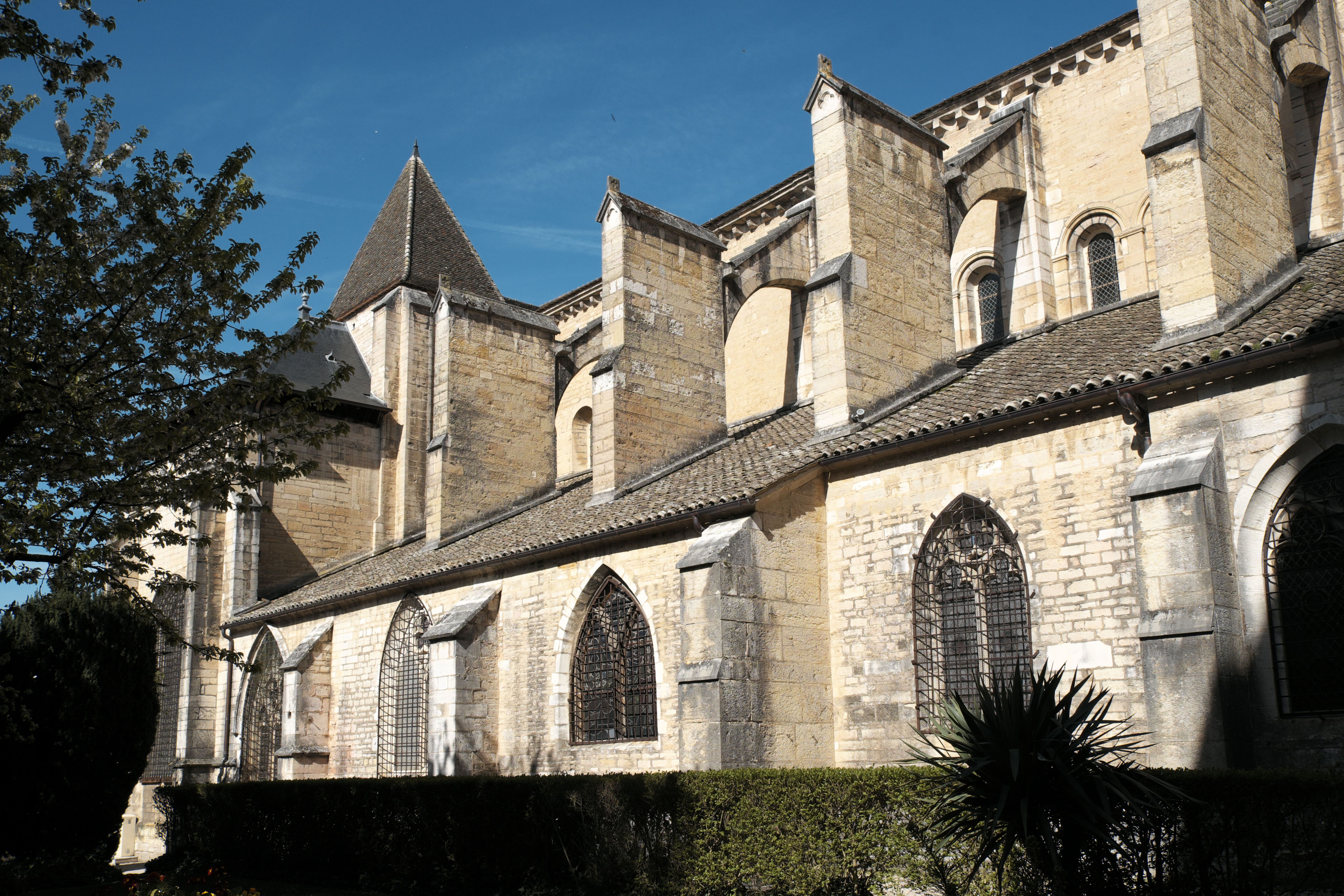 Katholische Pfarrkirche, ehemalige Stiftskirche, Notre-Dame in Beaune im Département Côte-d’Or (Bourgogne-Franche-Comté/Frankreich)